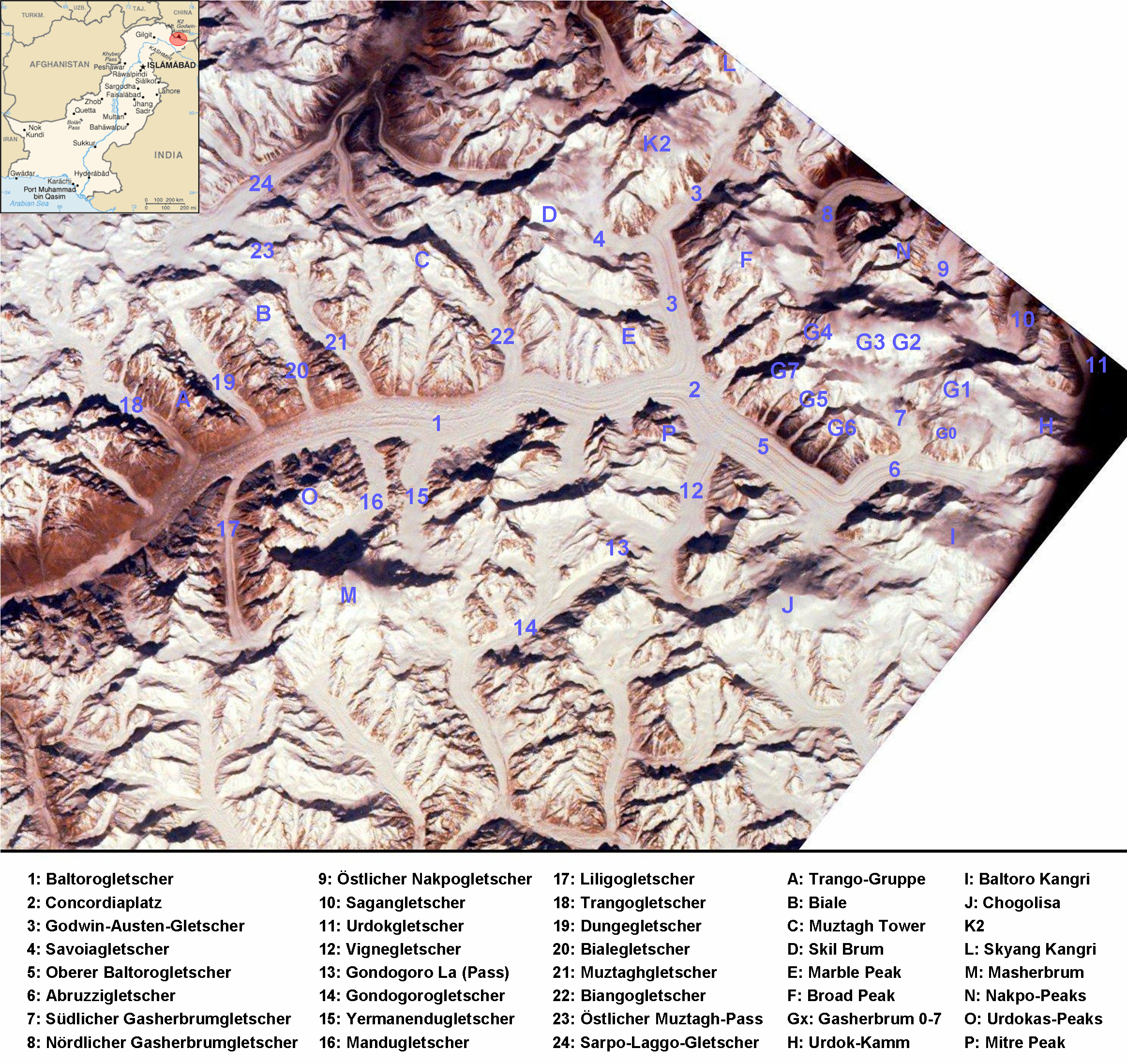 Die Baltoro-Region im Karakorum, zahlreiche Berge (u. a. K2, Broad Peak, Gasherbrums, Masherbrum, Trango-Türme) und Gletscher sind gekennzeichnet CIA map of Pakistan